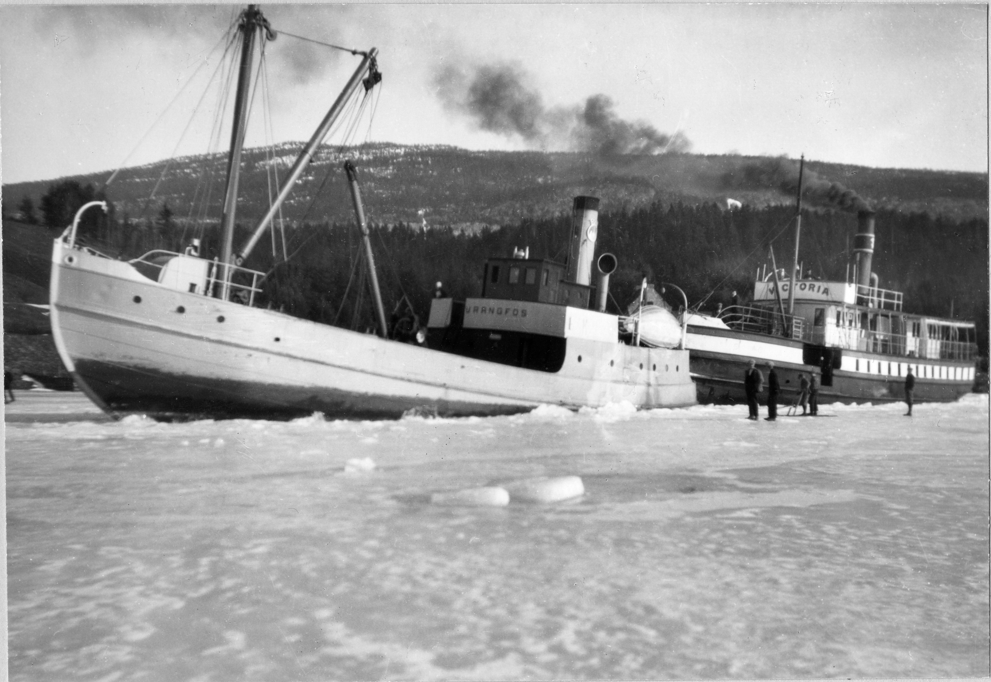 Bildet er hentet fra Arkivverket. D/S Vrangfos og D/S MS «Victoria» på Heddalsvannet 1929 Arkivinstitusjon : Statsarkivet i Kongsberg Arkivnavn : Skien -Telemarkens Dampskipsselskap Sted : Norge, Telemark, Notodden, Heddalsvannet Emneord: Heddalsvannet, Båt, Sluser Avbildet